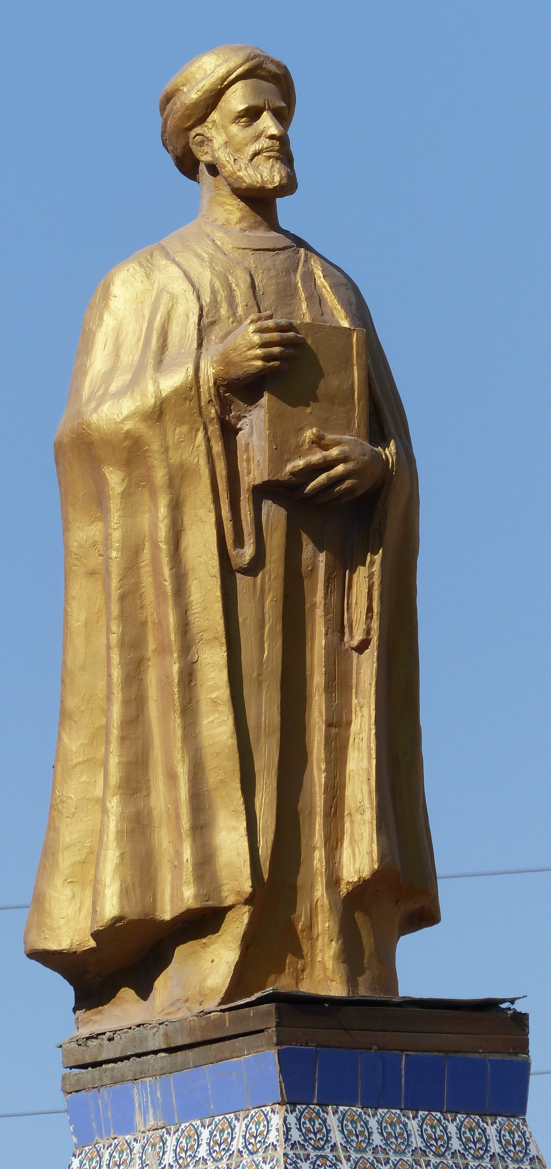 Statue dorée d'un homme à Tozeur